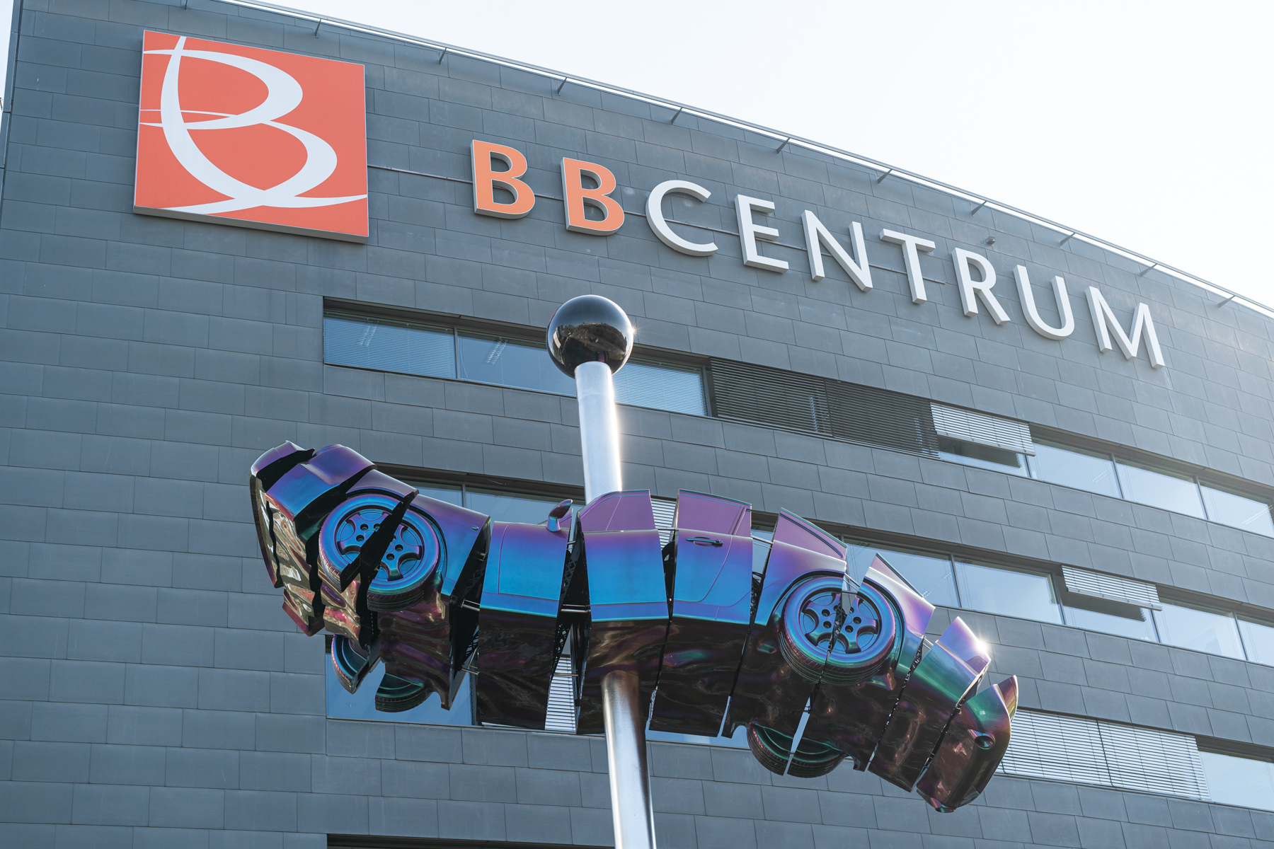 Socha Porsche 911